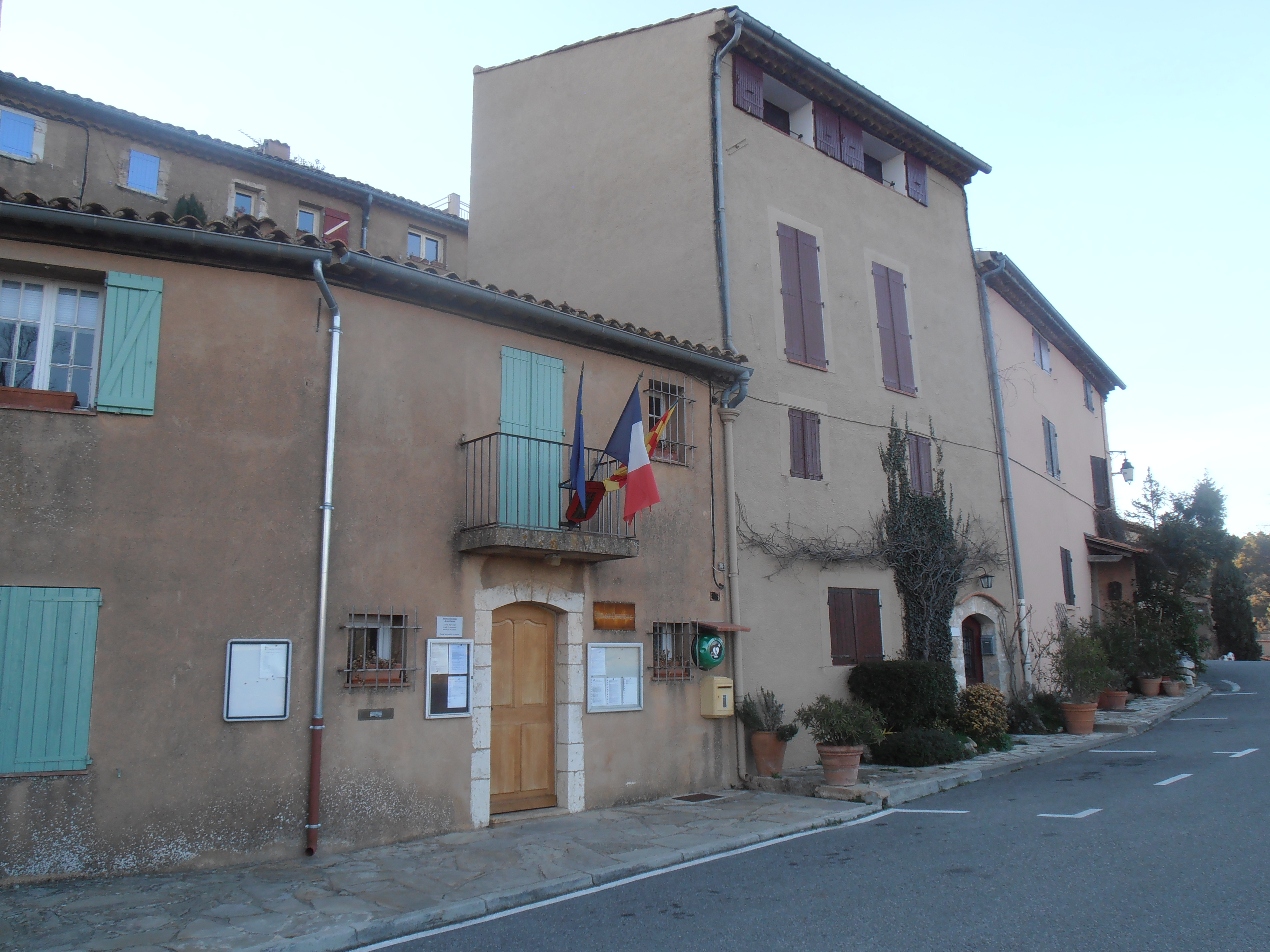 Var, Moissac-Bellevue, Mairie actuelle